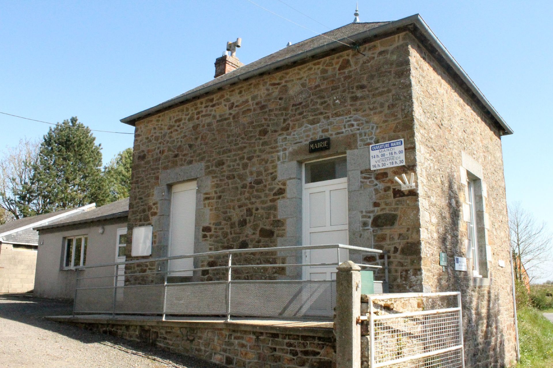 La Mairie du Luot